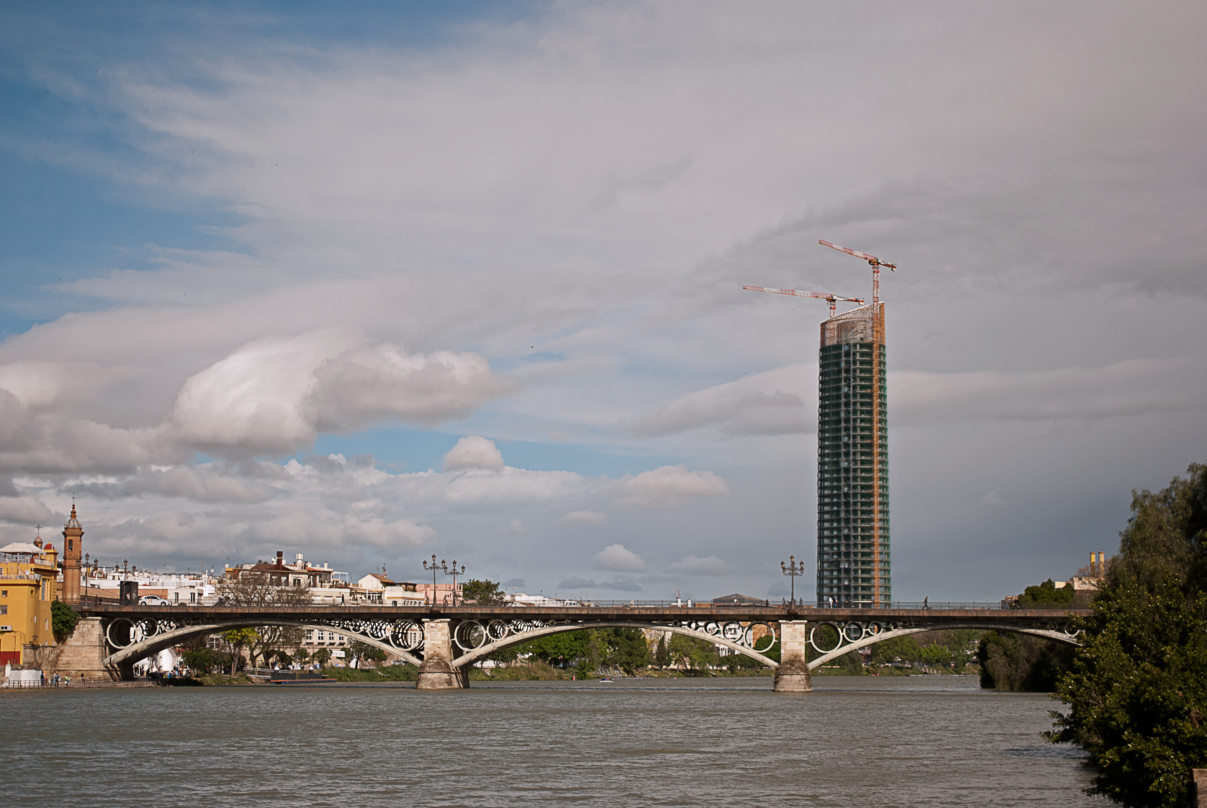 Puente de Triana. Sevilla